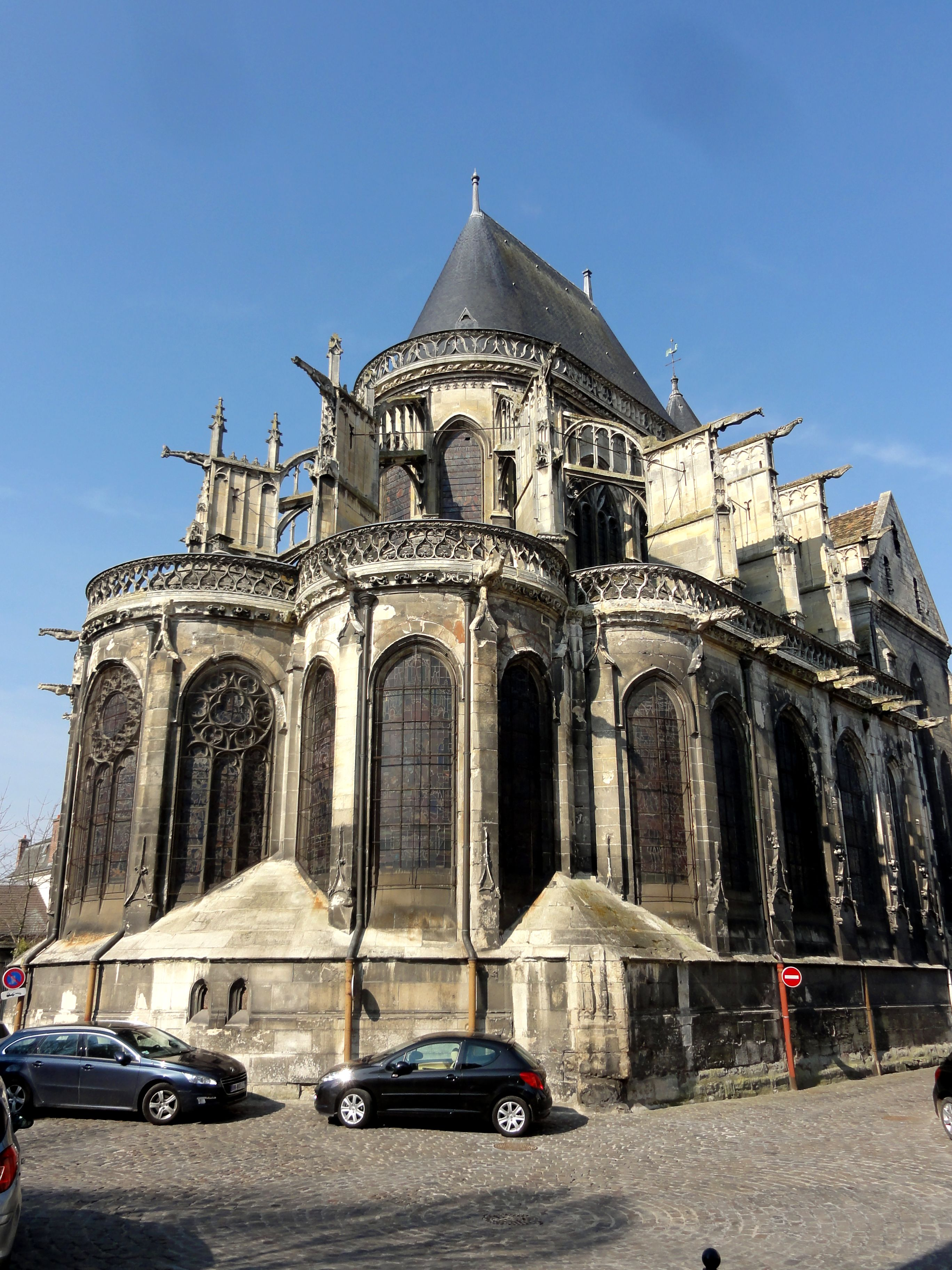 Chevet.